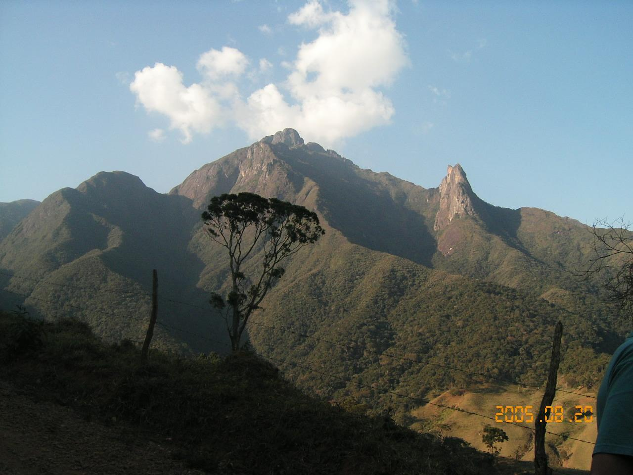 Vista do Pico dos Marins, na Serra da Mantiqueira, estado de São Paulo, Brasil